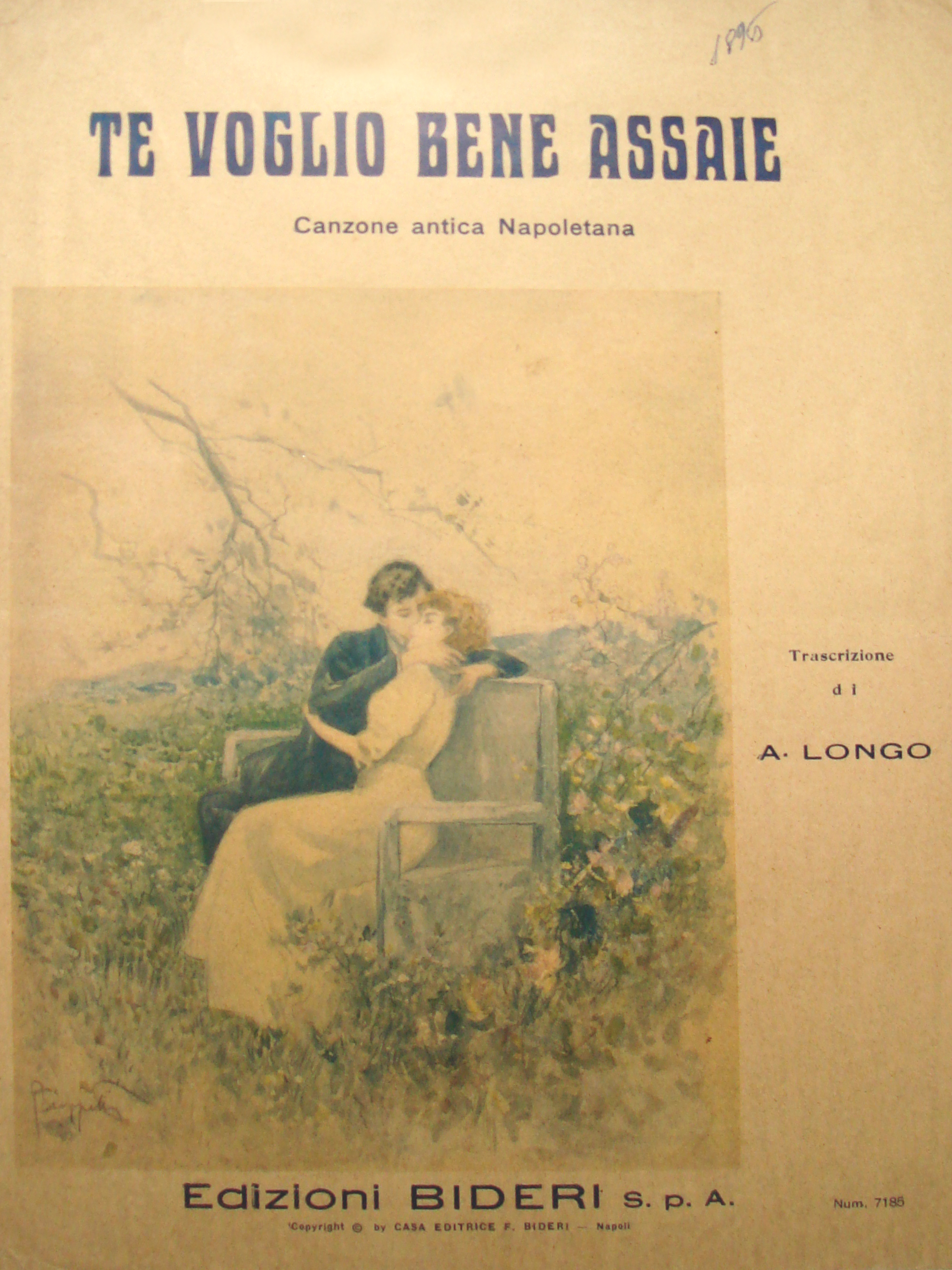 Copertina della partitura originale del brano "Te voglio bene assaje" del 1839.